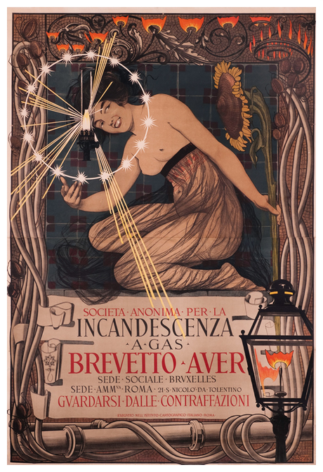 Incandescenza a gas